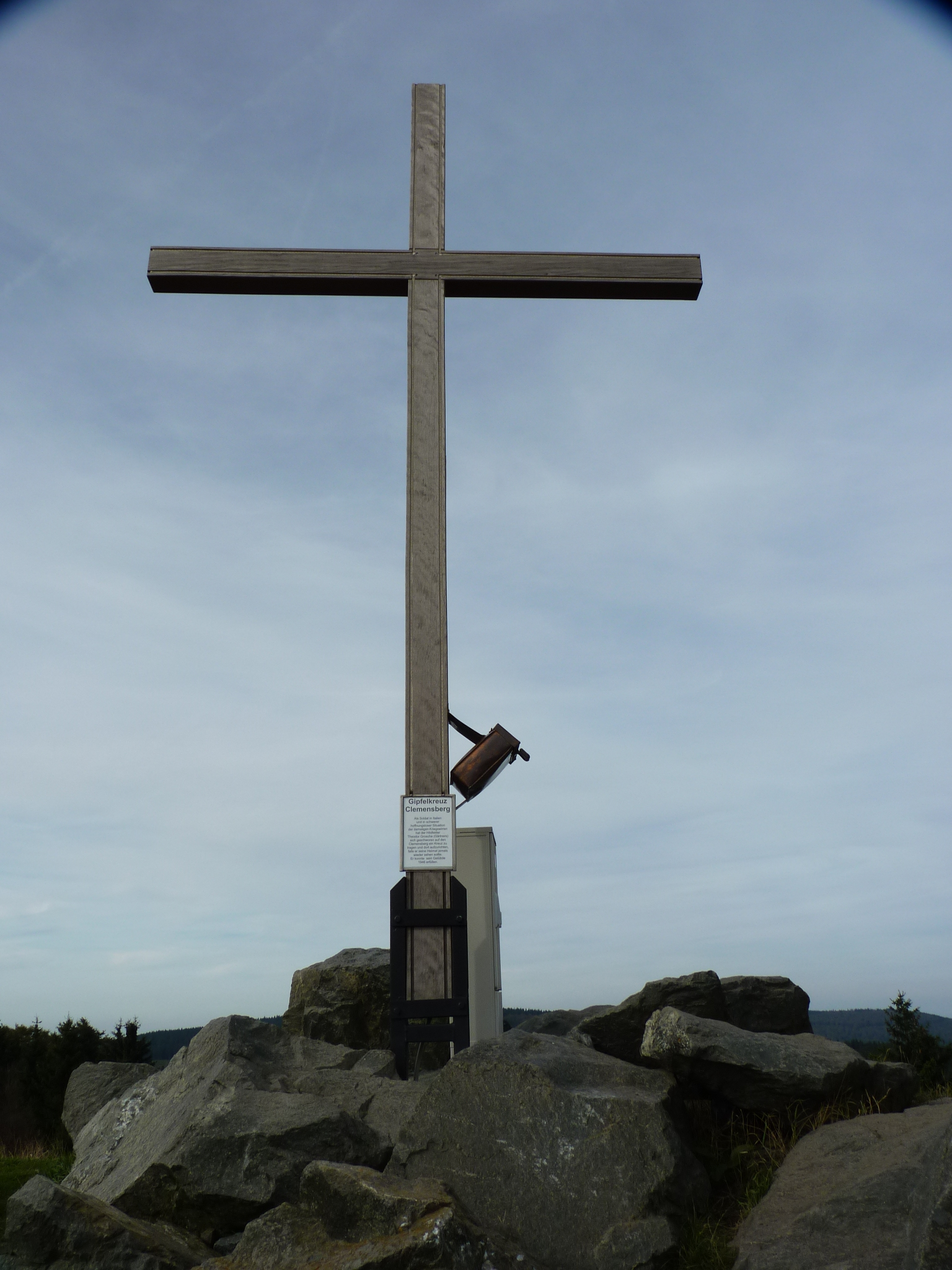 Das Gipfelkreuz auf dem Clemesberg im September 2014